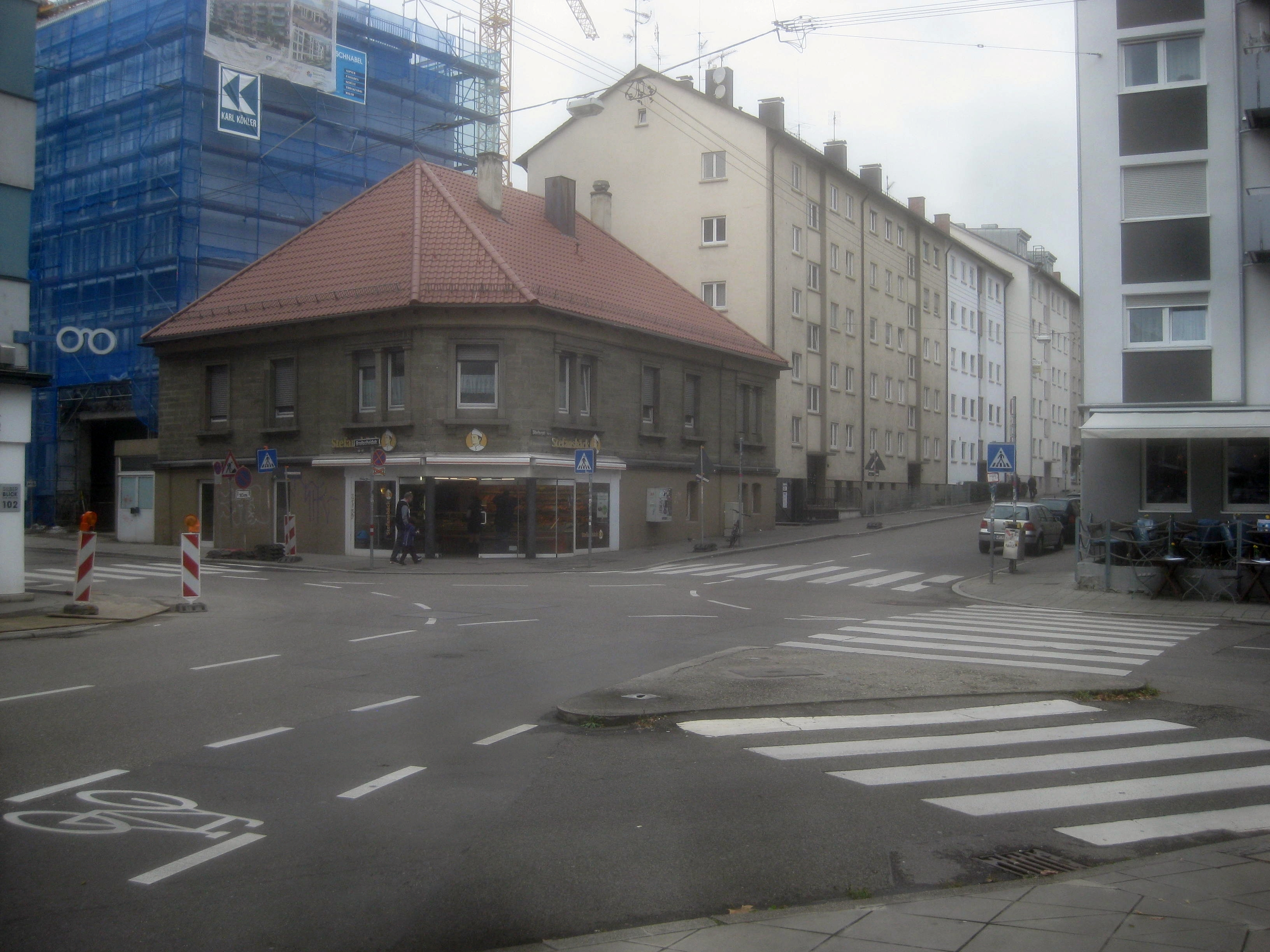 Blick auf die Kreuzung Breitscheidstraße / Silberburgstraße in Stuttgart. Die kleine dreieckige Verkehrsinsel erinnert an die Haltestelle „Dreieck“ der früheren Straßenbahnlinie 3, die hier bis 1924 von der Silberburgstraße nach rechts in die Breitscheidstraße abbog.